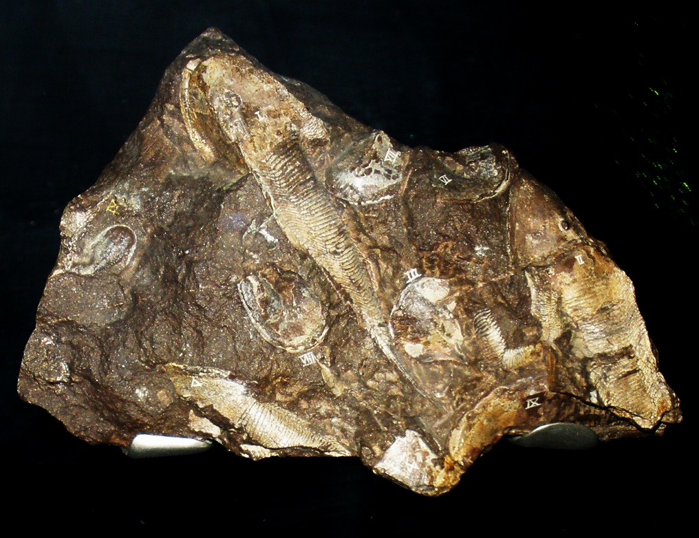 Fossil of Hemicyclaspis, an extinct fish-- Took the photo at Natural History Museum, London